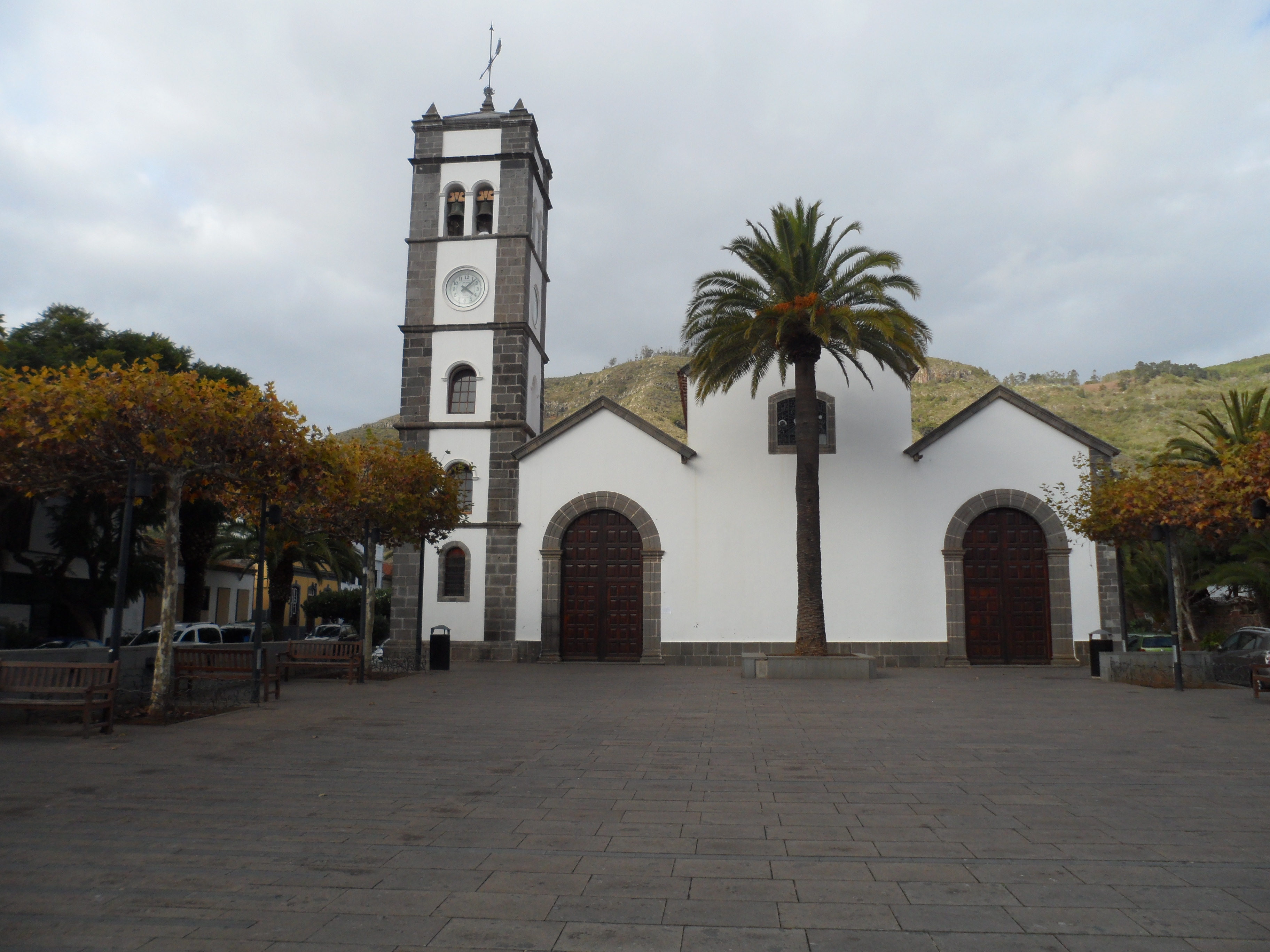 Plaza San Marcos e Iglesia de San Marcos Evangelista.